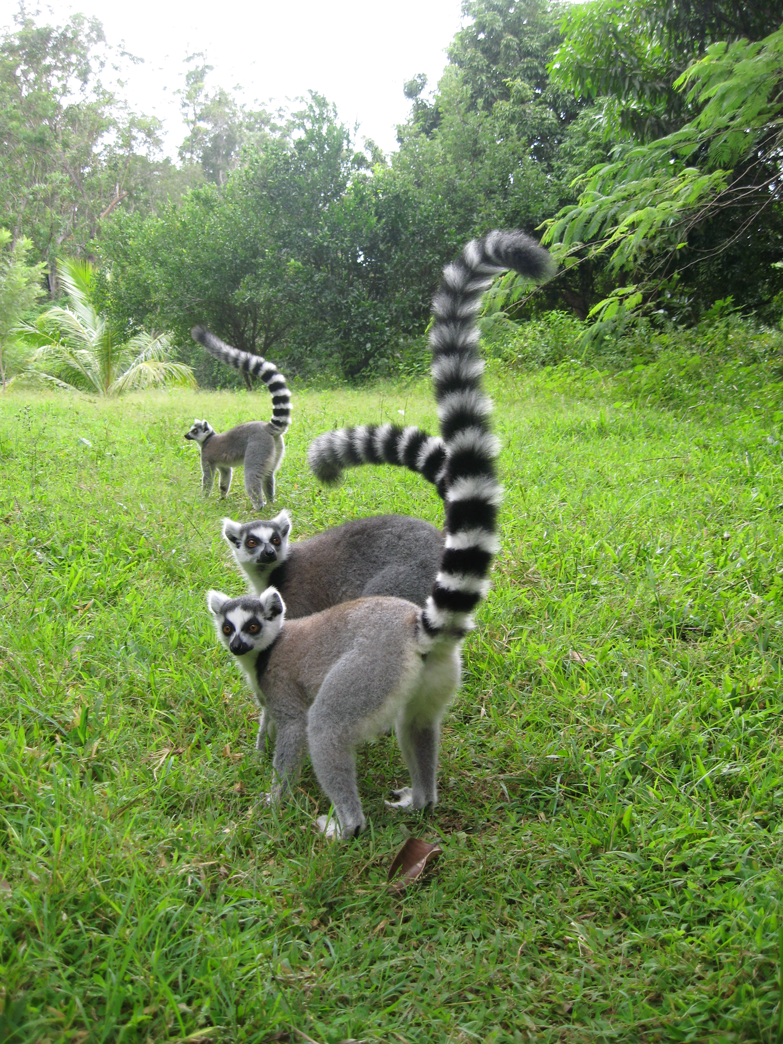 Lemur catta